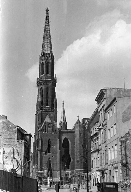 Berlin, Petrikirche, Ruine Illus Richter 2.5.51 Berlins Denkmalskirchen werden wieder aufgebaut. Der demokratische Magistrat von Groß-Berlin hat für 1951 größere Beträge für die Wiedererrichtung der durch anglo-amerikanische Bomben zerstörten Kirchen bereitgestellt. UBz: An der Petrikirche am Köllnischen Fischmarkt sind Sicherungsarbeiten geplant. Einsturzgefährdete Turmteile werden abgetragen und die Schließung von Einschußlöchern ist schon im Gange.